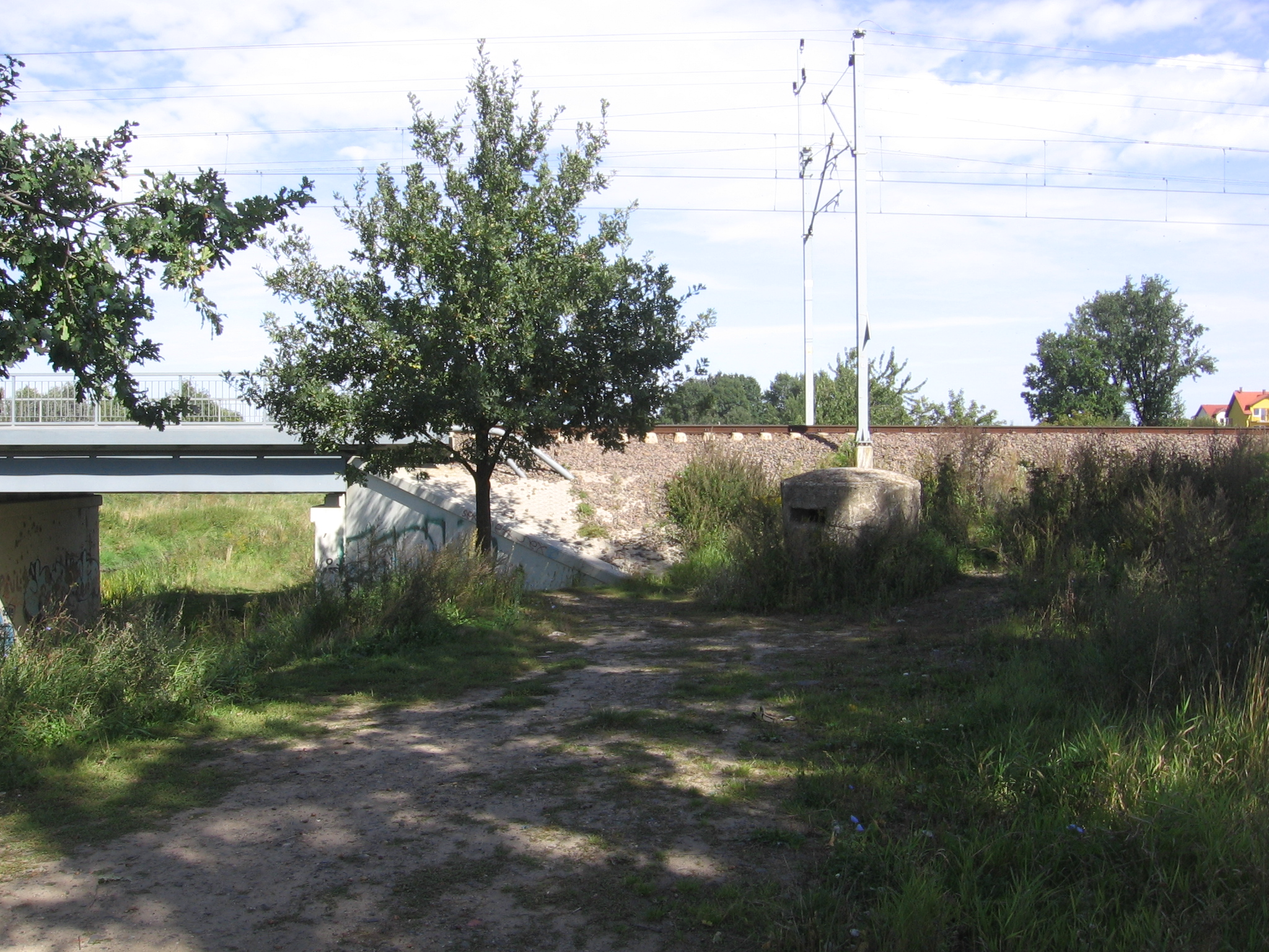 Wiadukt kolejowy nad Ślęzą i mały bunkier z czasów II wojny światowej w Żernikach we Wrocławiu